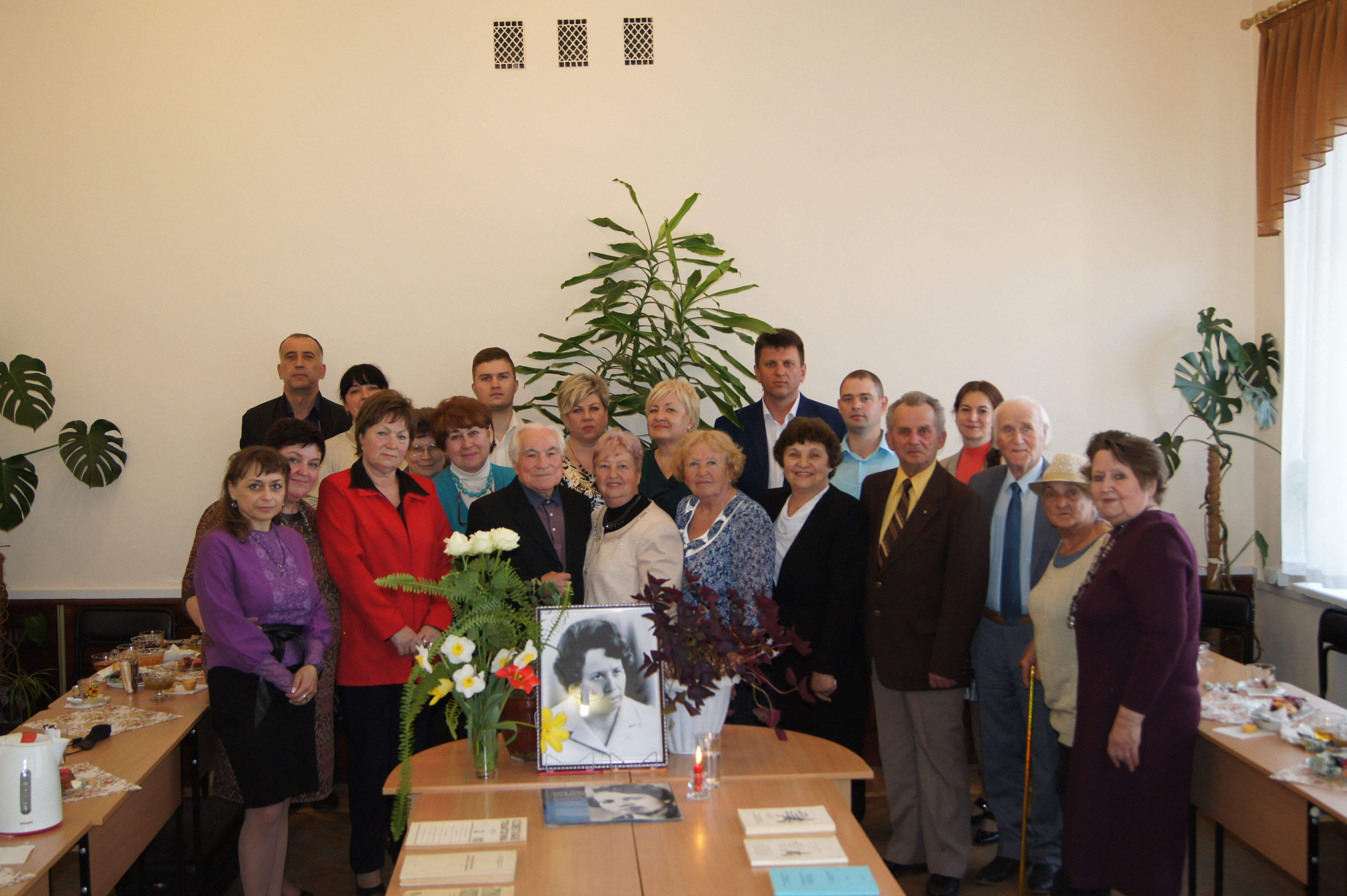 Педагогические чтения к 90-летию А.Б.Щербо